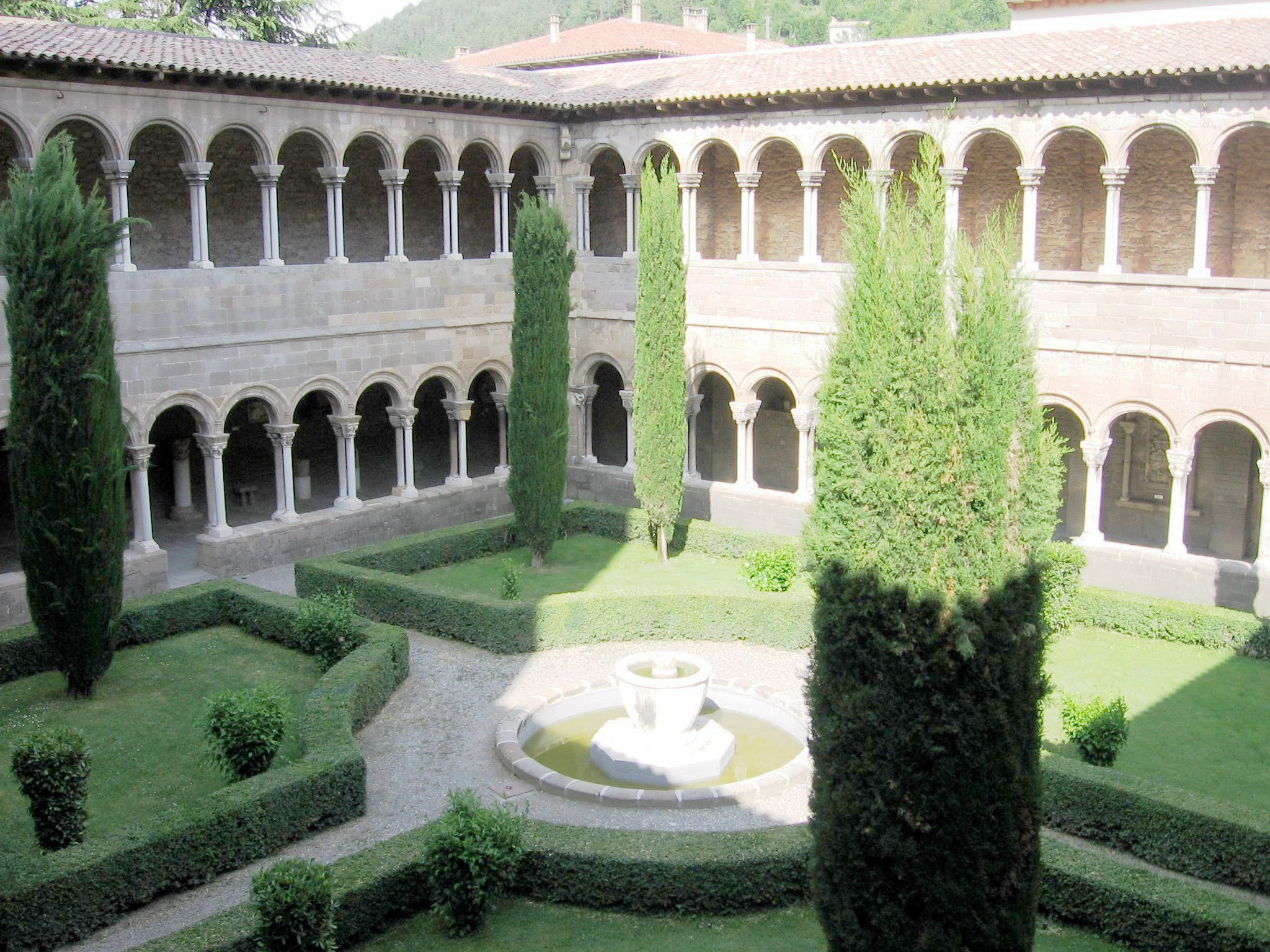 Claustro de Santa María de Ripoll